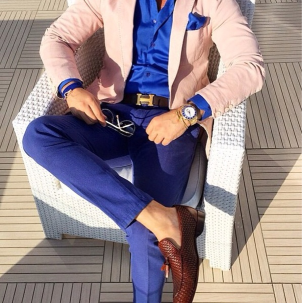 Elegancia y clase